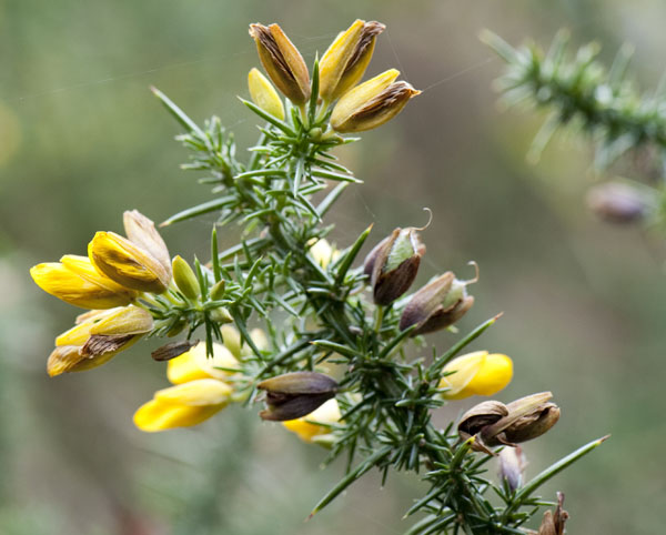 Ulex gallii subsp. gallii (syn. Ulex cantabricus Álv. Mart., Fern. Casado, Fern. Prieto, Nava & Vera) (Tojo, Cotolla), en el Jardín Botánico de Gijón.